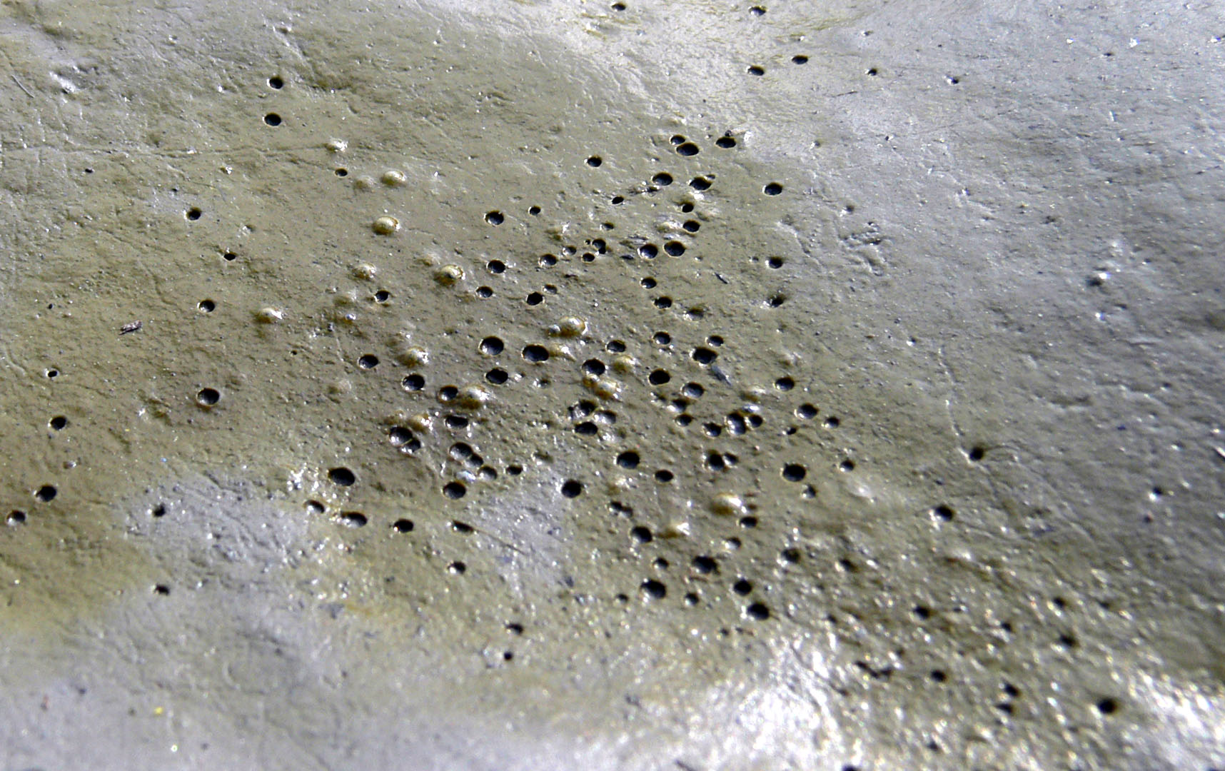 Biofilm sur vase (se formant en quelques heures, de temps que la marée descende), les trous sont laissés par des bulles remontées en surface et ayant éclaté dans le film superficiel. Lieu : Port de Saint Goustan, à Auray, en Bretagne sud (Morbihan), exposé à une eau saumâtre.